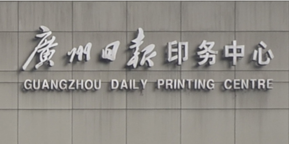 廣州日報印務中心門口大字